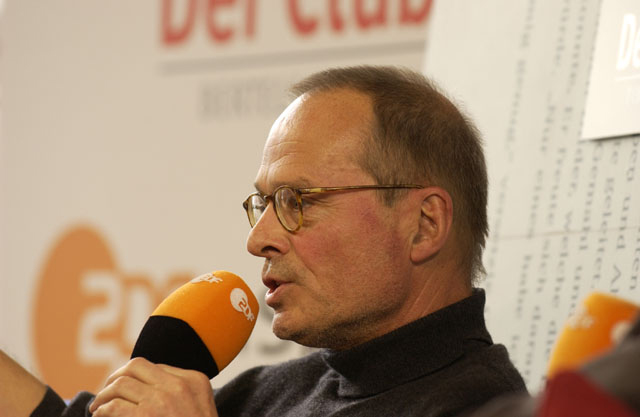 Nur für redaktionelle Nutzung / Editorial use only. Dieses Foto dürfen Sie honorarfrei nutzen, wenn Sie folgenden credit beachten: Copyright: Das blaue Sofa / Club Bertelsmann. Wolf Wondratschek, 1943 geboren in Rudolstadt und aufgewachsen in Karlsruhe, studierte Literaturwissenschaft und Philosophie in Heidelberg, Göttingen und Frankfurt am Main. 1969 veröffentlichte er sein erstes Buch „Früher begann der Tag mit einer Schusswunde“. 1970-71 lebte er in London und hatte eine Gastdozentur für Poetik an der Universität Warwick inne.